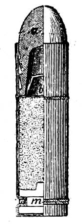 Фигура 2. Бумажный патрон Карле. Это изображение было использовано для иллюстрирования статьи «Игольчатое ружье» опубликованной в десятом томе «Военной энциклопедии», который был издан книгоиздательским товариществом И. Д. Сытина в 1912—1913 гг. в столице Российской империи городе Санкт-Петербурге.